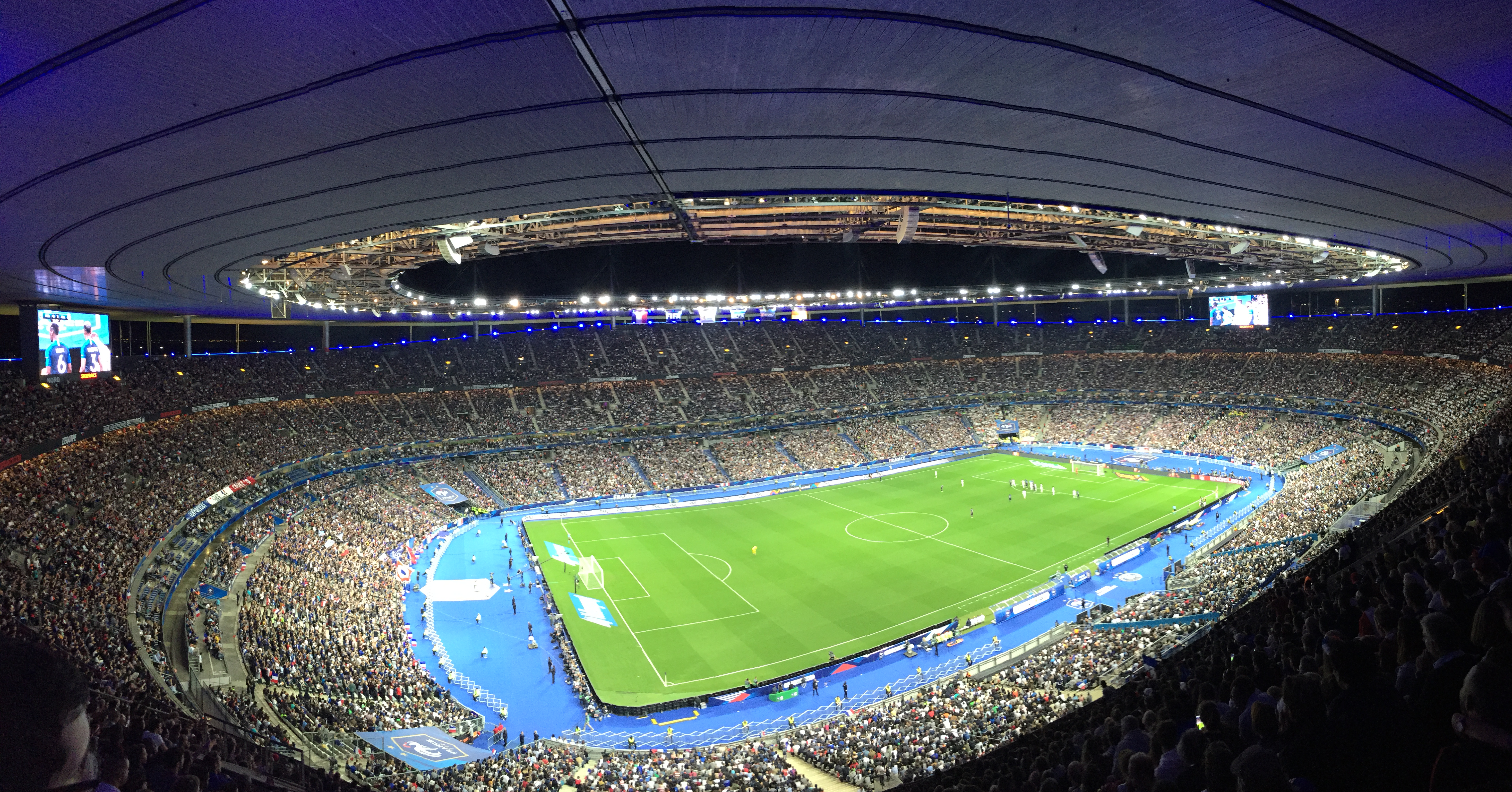 France-Allemagne en ligue des Nations au stade de France le 16 octobre 2018